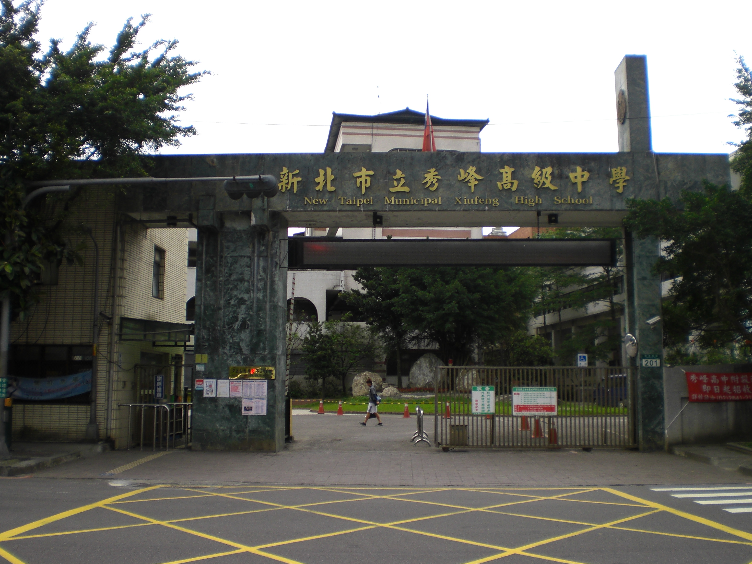 中文（台灣）: 新北市立秀峰高級中學，位於臺灣新北市汐止區忠孝東路201號。